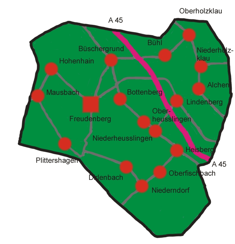 Stadtgliederung Freudenberg (Siegerland)